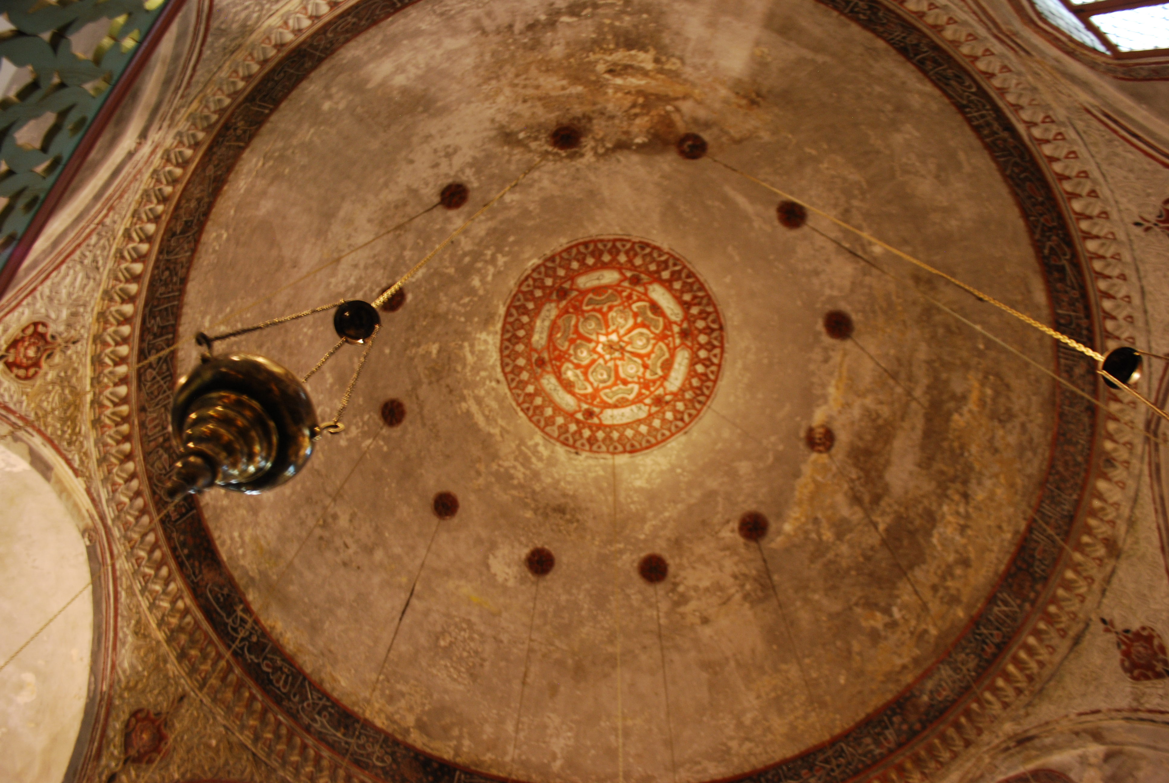 Vue de Ioannina, en Epire.